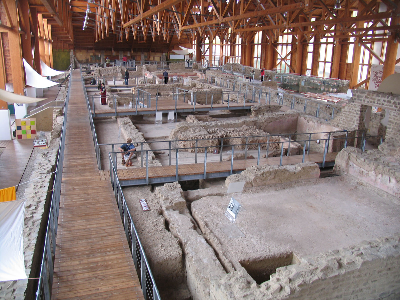 Museum Römervilla Bad Neuenahr-Ahrweiler